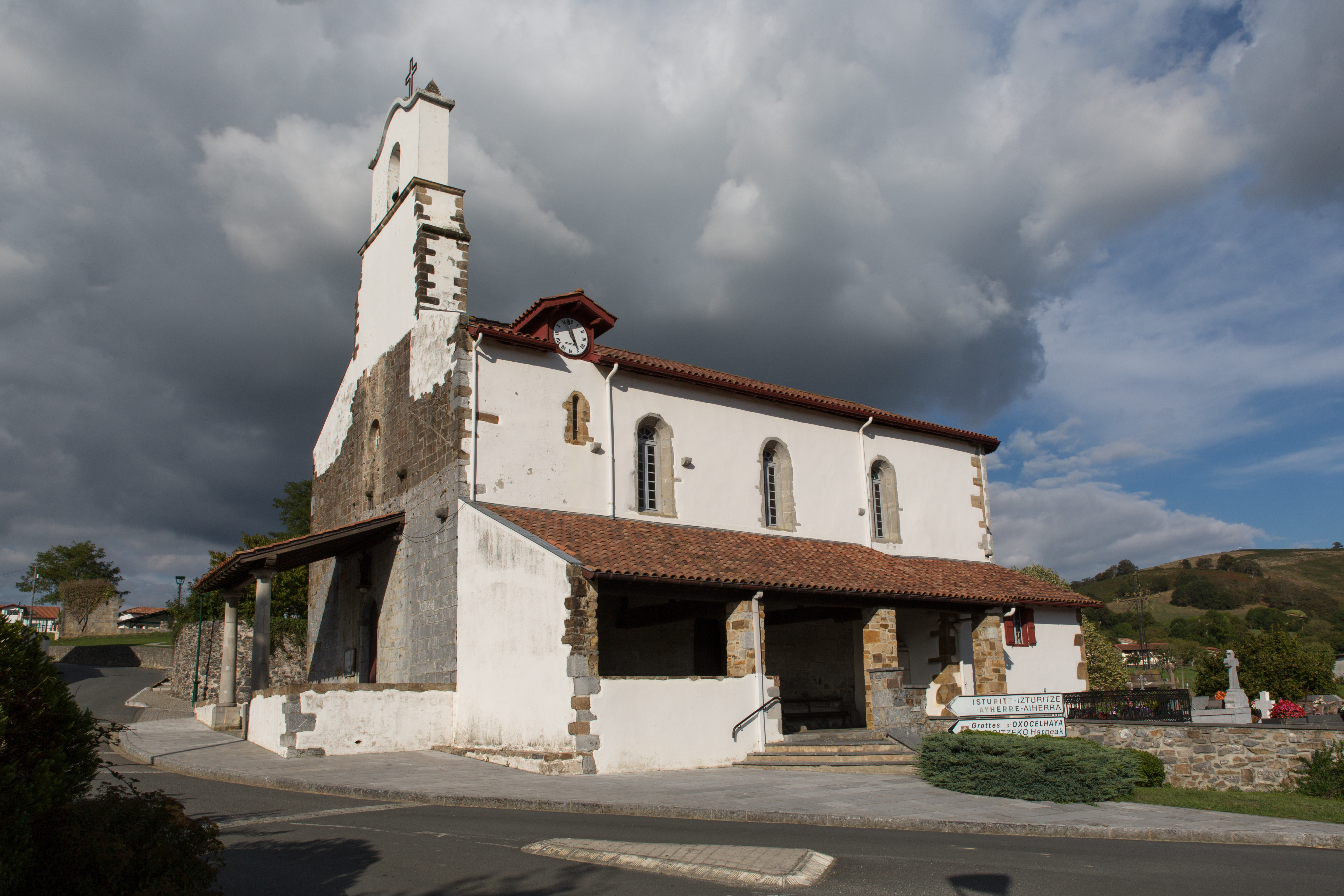 Église